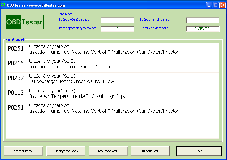 Chybove kody - mody 3,7,10 v programu OBDTester